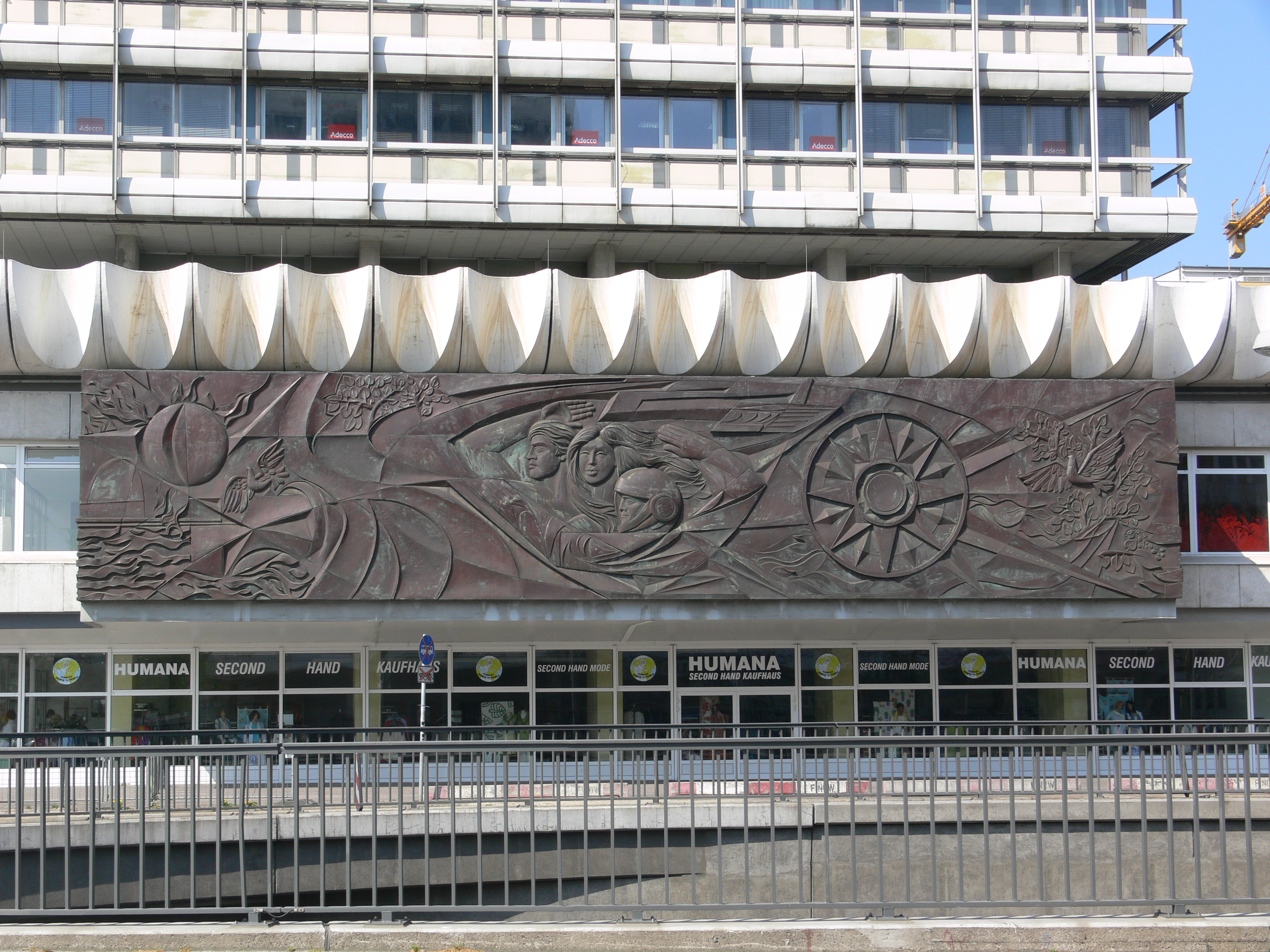 Berlin-Mitte, "Haus des Reisens", östliche Fassade mit Relief "Der Mensch überwindet Zeit und Raum" von Walter Womacka